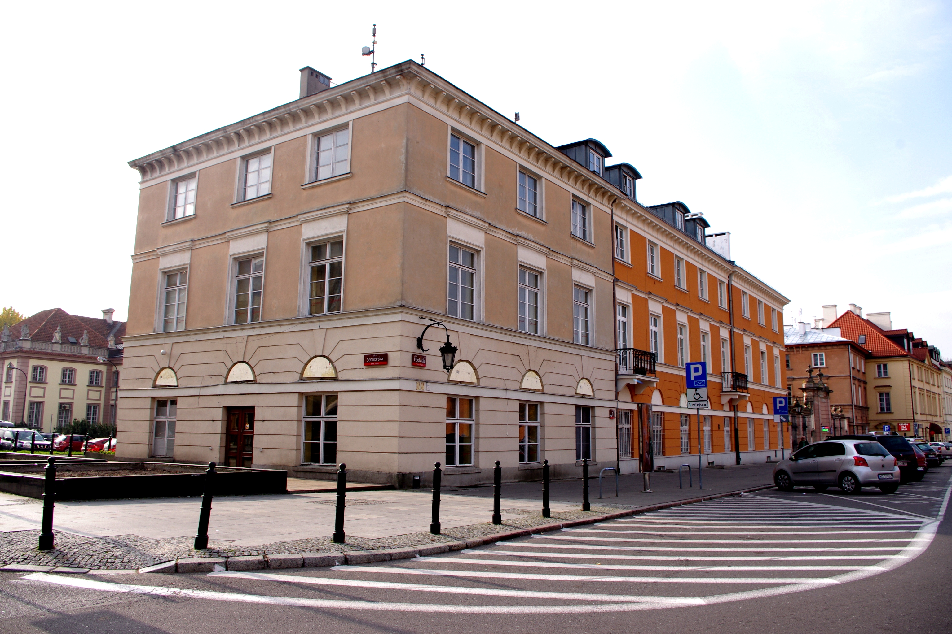 Kamienica przy ul. Podwale 1 w Warszawie